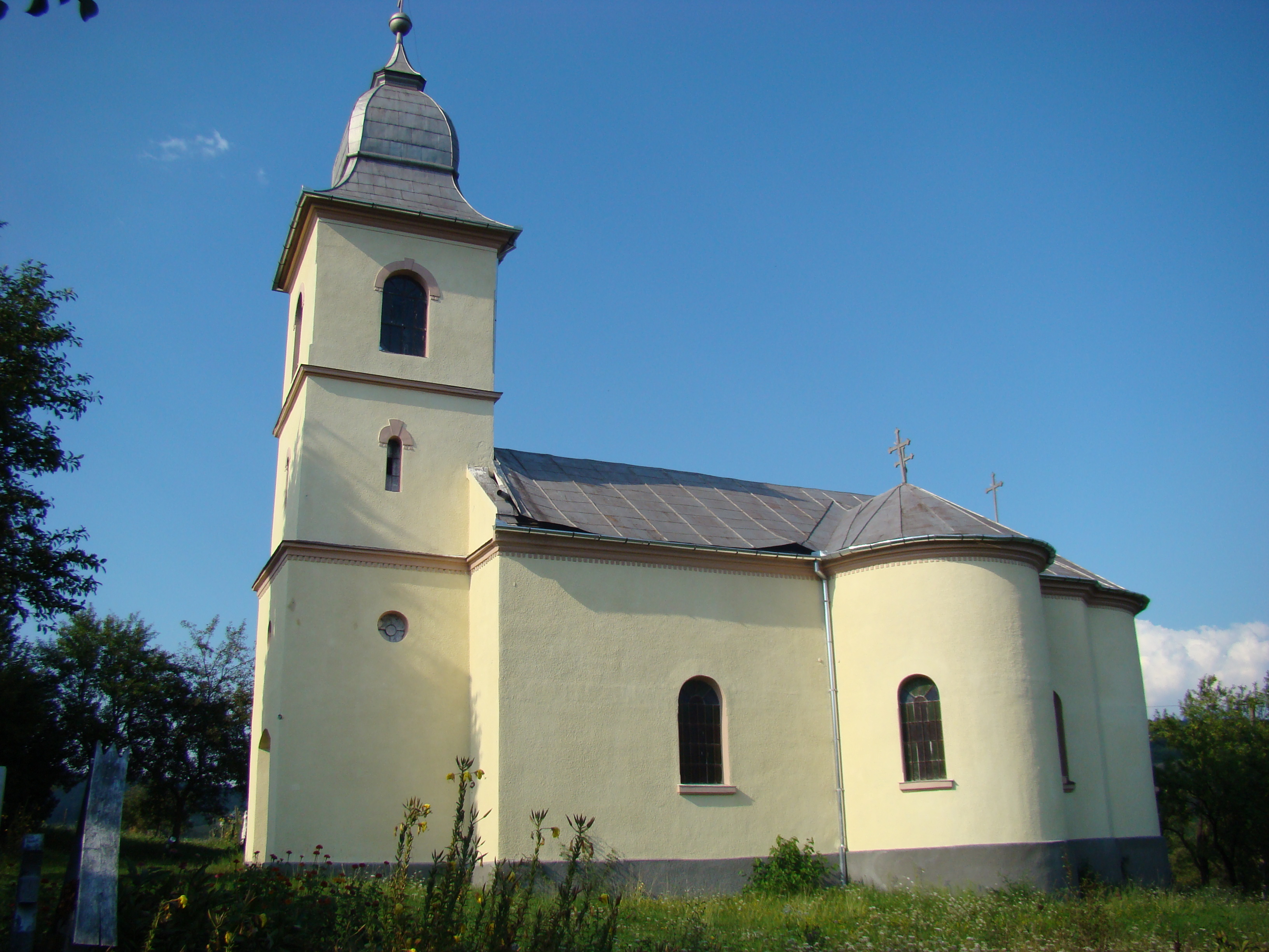 Biserica ortodoxă din Popești, Hunedoara